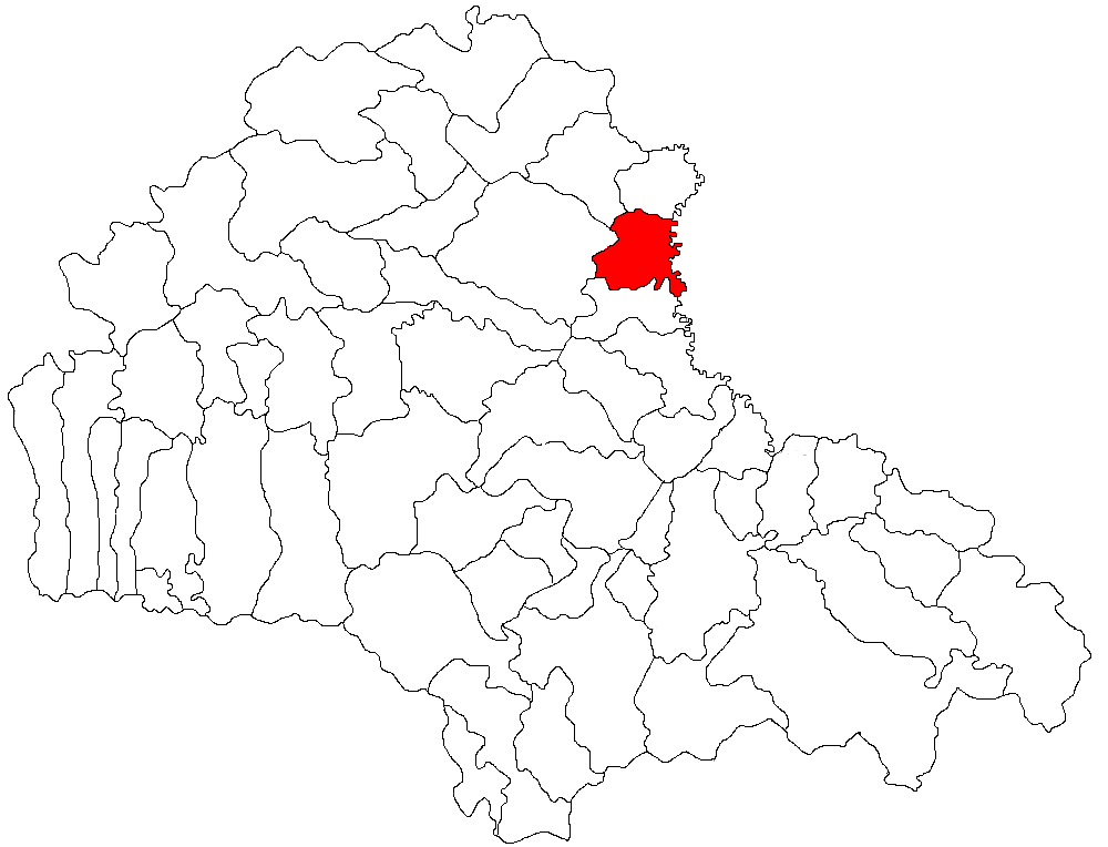 Categorie:Hărţi ale judeţului Braşov